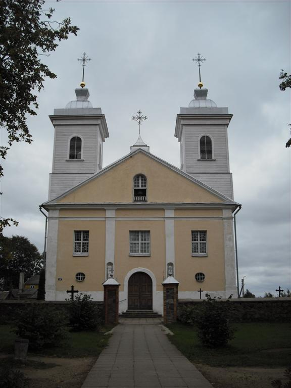 Pandėlio Švč. Mergelės Marijos Vardo bažnyčia